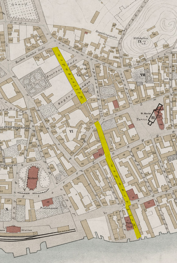 Møllegaten i Tønsberg, 1883. Utsnitt av originalfil.